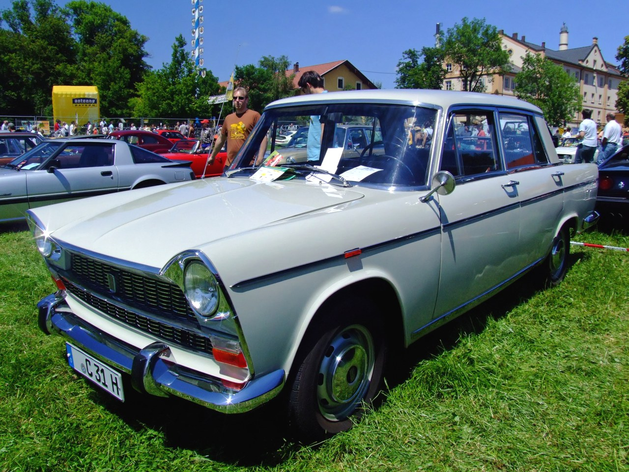 Quelle: selbst fotografiert, 06/2007 Fotograf: Späth Chr.